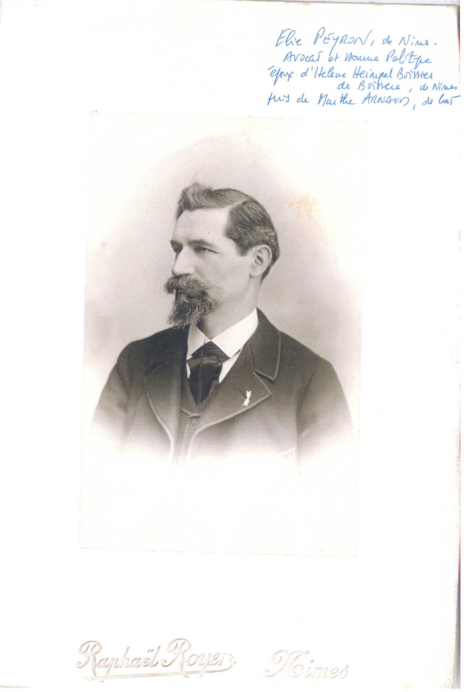 Elie Scipion Peyron ; homme politique français (conseiller d'arrondissement de Nimes, député suppléant du Gard)fondateur de la revue socialiste, avocat à la cour d'appel de Nimes, écrivain